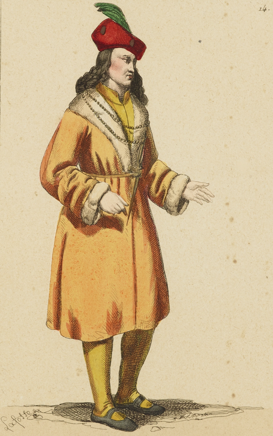 Portrait en pieds de Pierre Landais, vêtu de jaune. Il porte une dague à la taille.